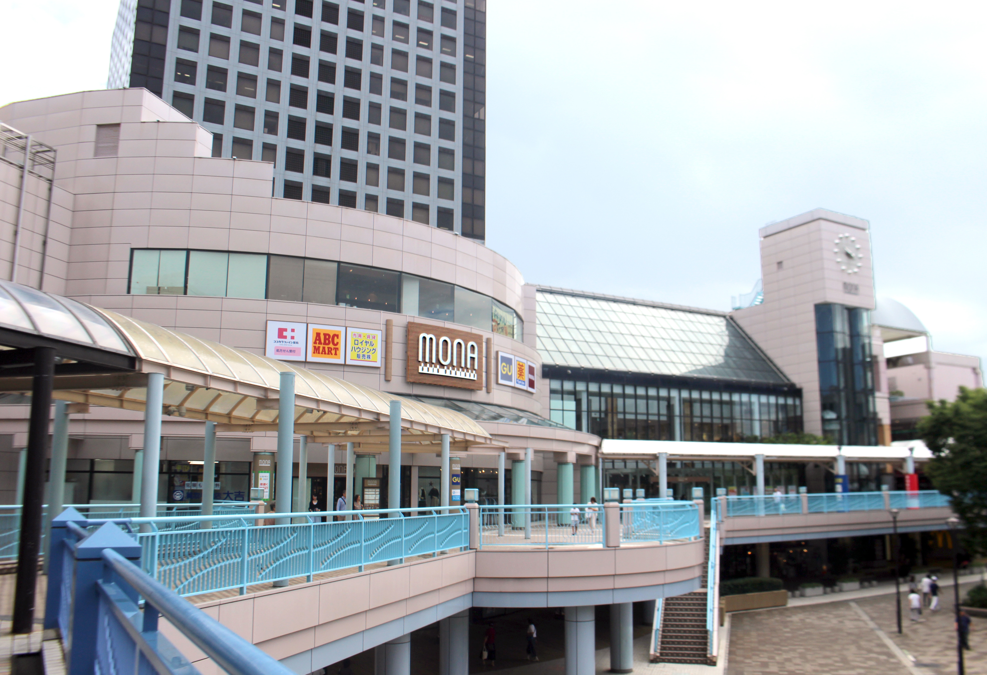 MONA新浦安 20190812